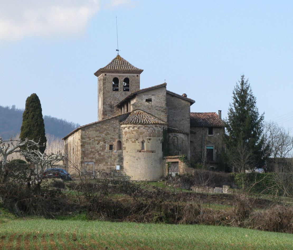 Roman Church: Santa Magarida de Bianya (Val de Bianya (near Olot), Catalunya, Spain)